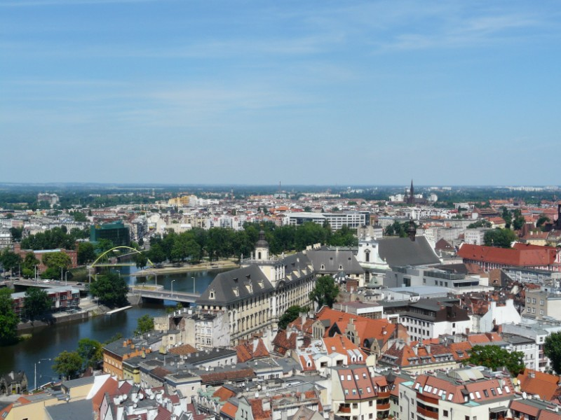 Vratislav - scenérie